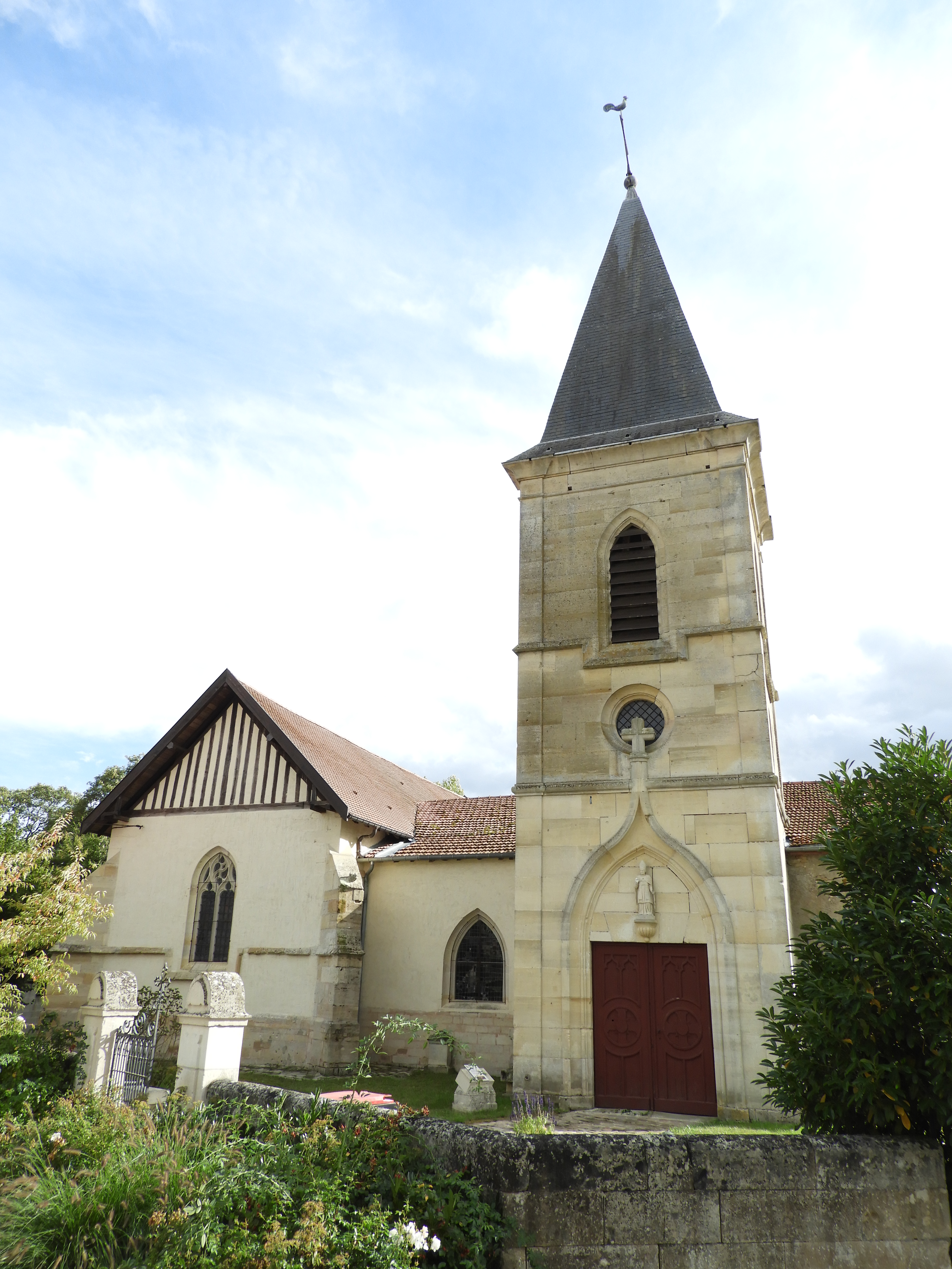 Église Saint-Brice de Villotte-devant-Louppy (PA00106679), photographiée le 21/09/2018